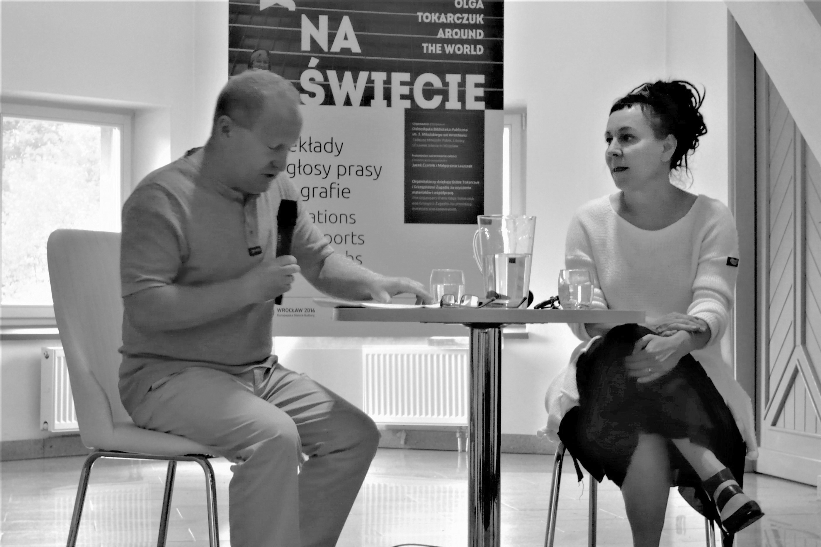 K. Maliszewski i O. Tokarczuk podczas Festiwalu Góry Literatury (2017)